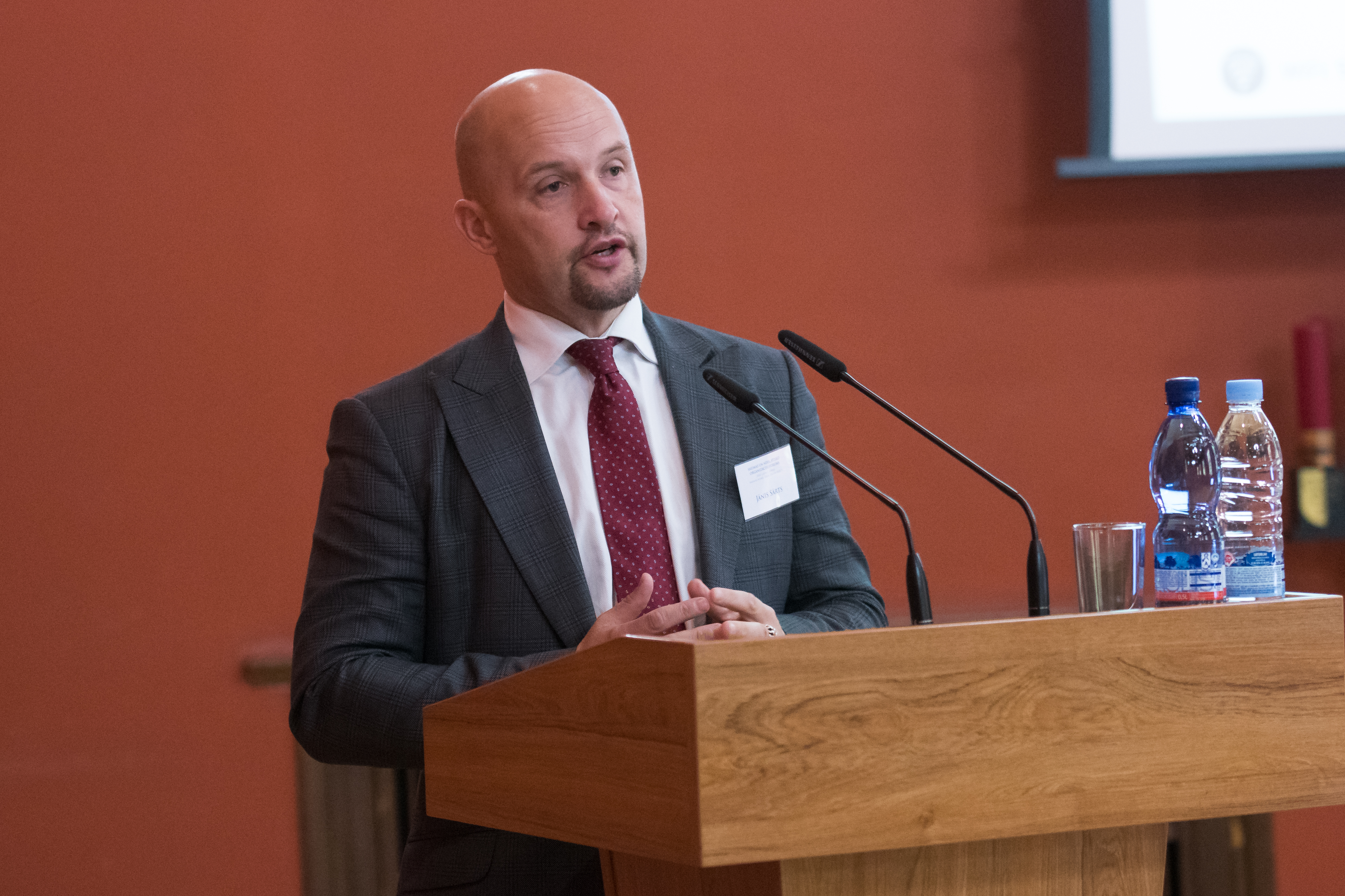 2018.gada 1.jūnijs. Saeimas namā notiek Saeimas un nevalstisko organizāciju forums "Valsts esam mēs!" Foto: Ieva Ābele, Saeima Izmantošanas noteikumi: saeima.lv/lv/autortiesibas